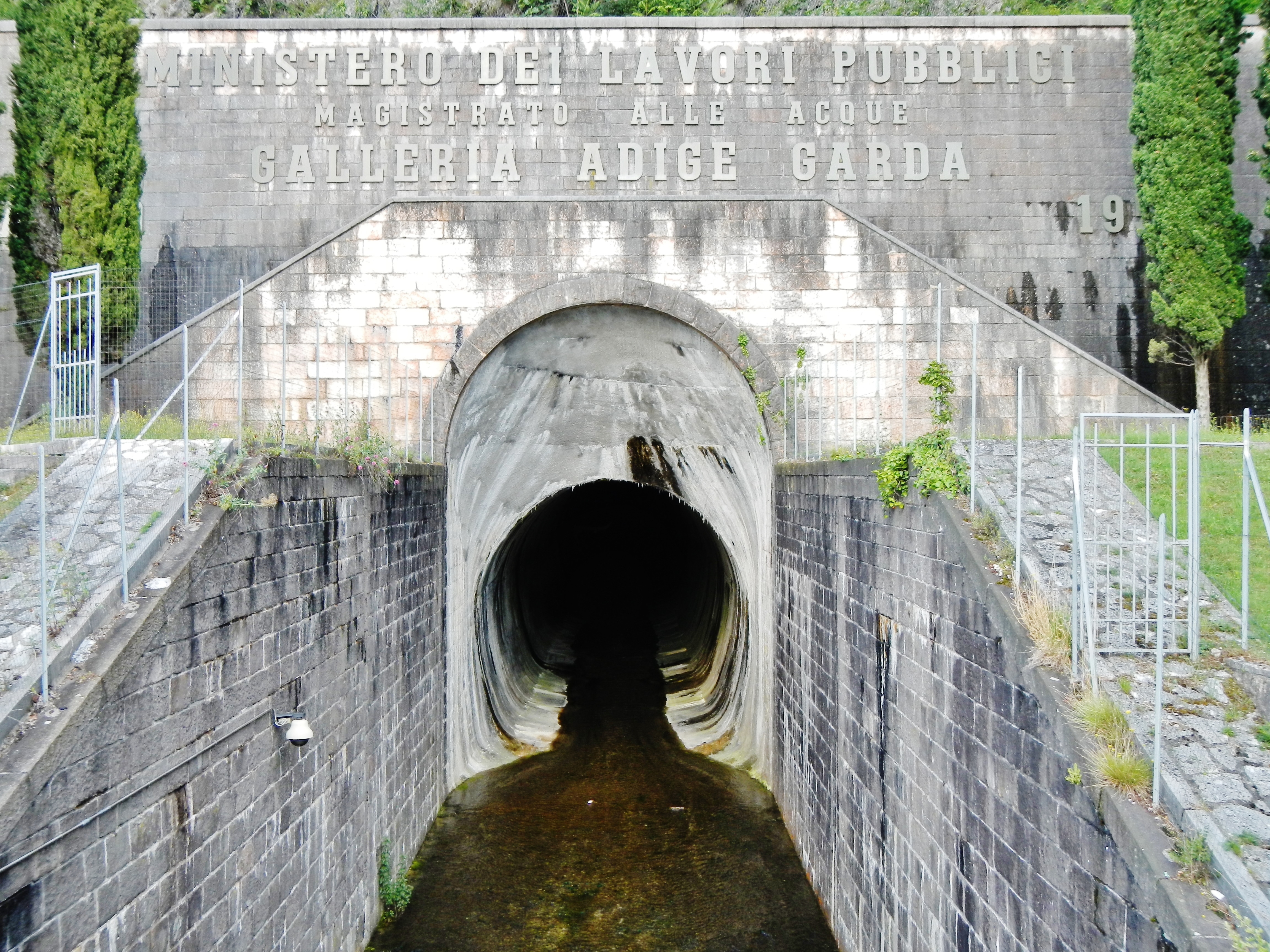 La Galleria Adige-Garda è un tunnel scolmatore che permette di mettere in comunicazione il fiume Adige con il lago di Garda